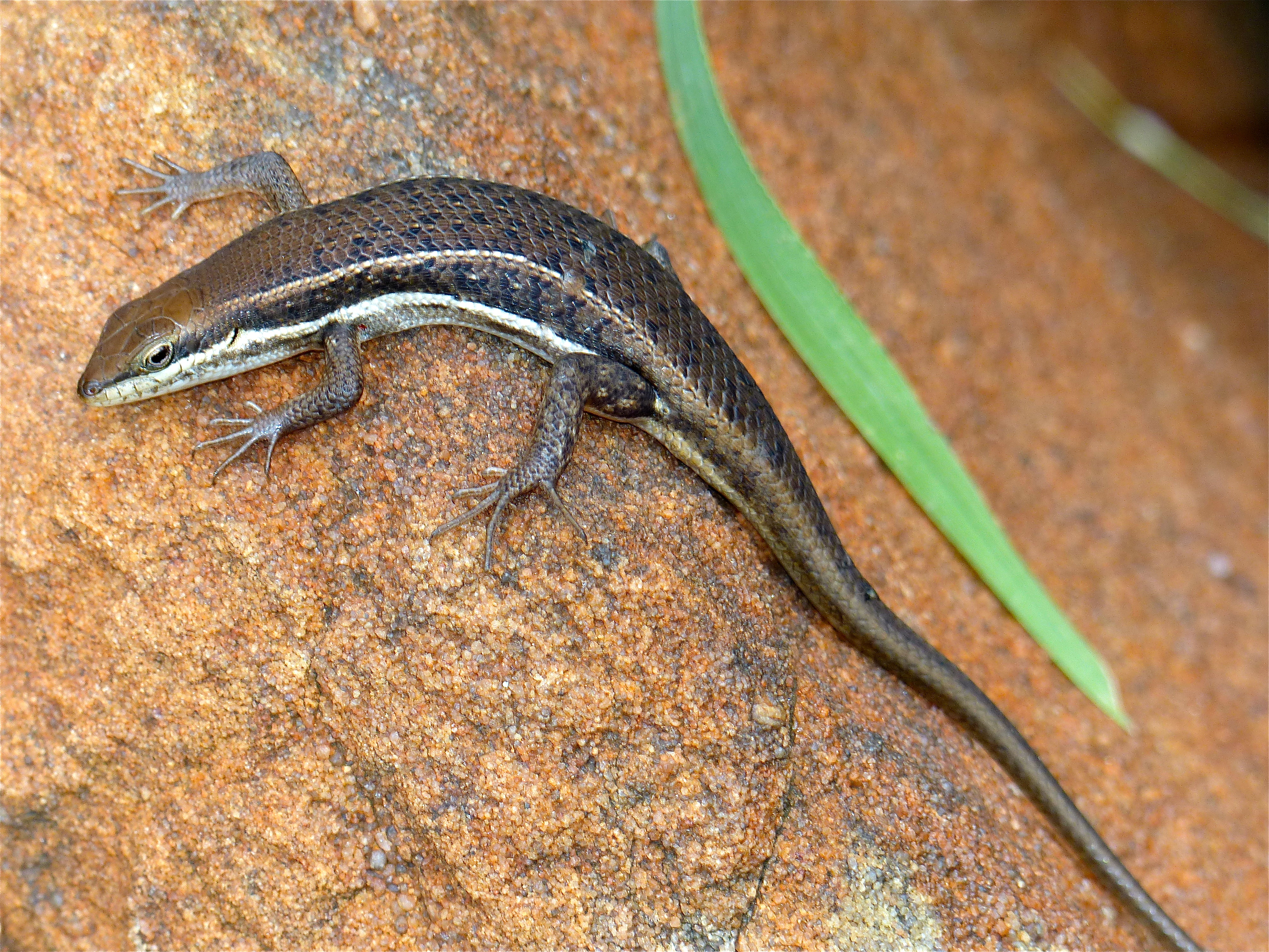 Punda Maria Camp, Kruger NP, SOUTH AFRICA